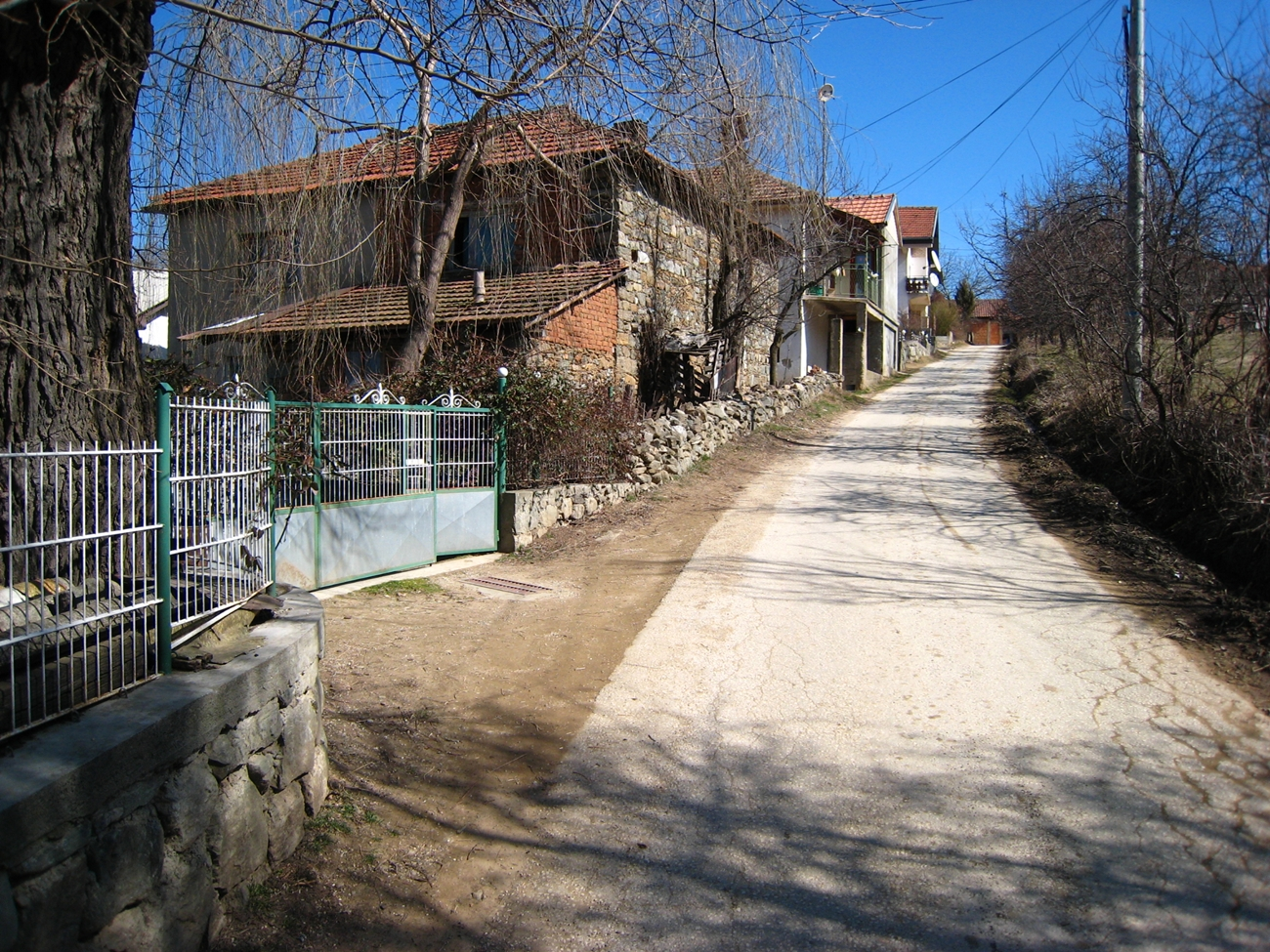 Konopnica